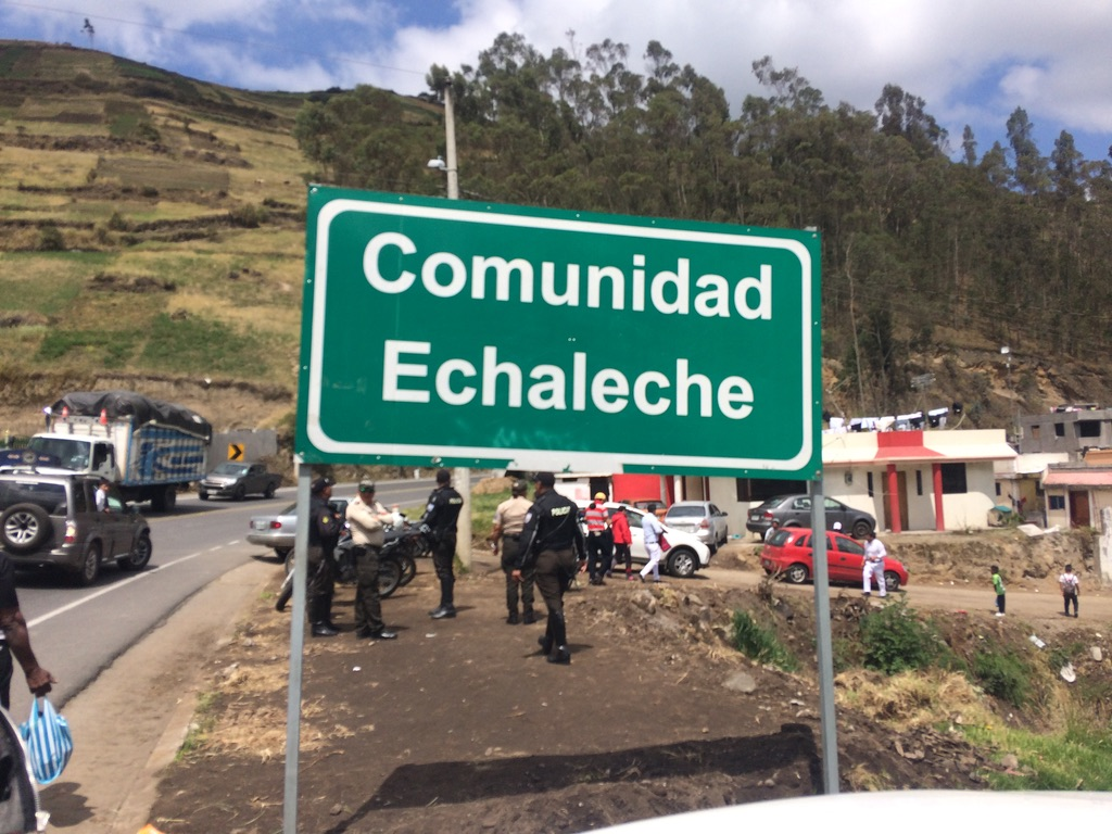 Entrada del Estadio Mushuc Runa COAC. Comunidad Echaleche